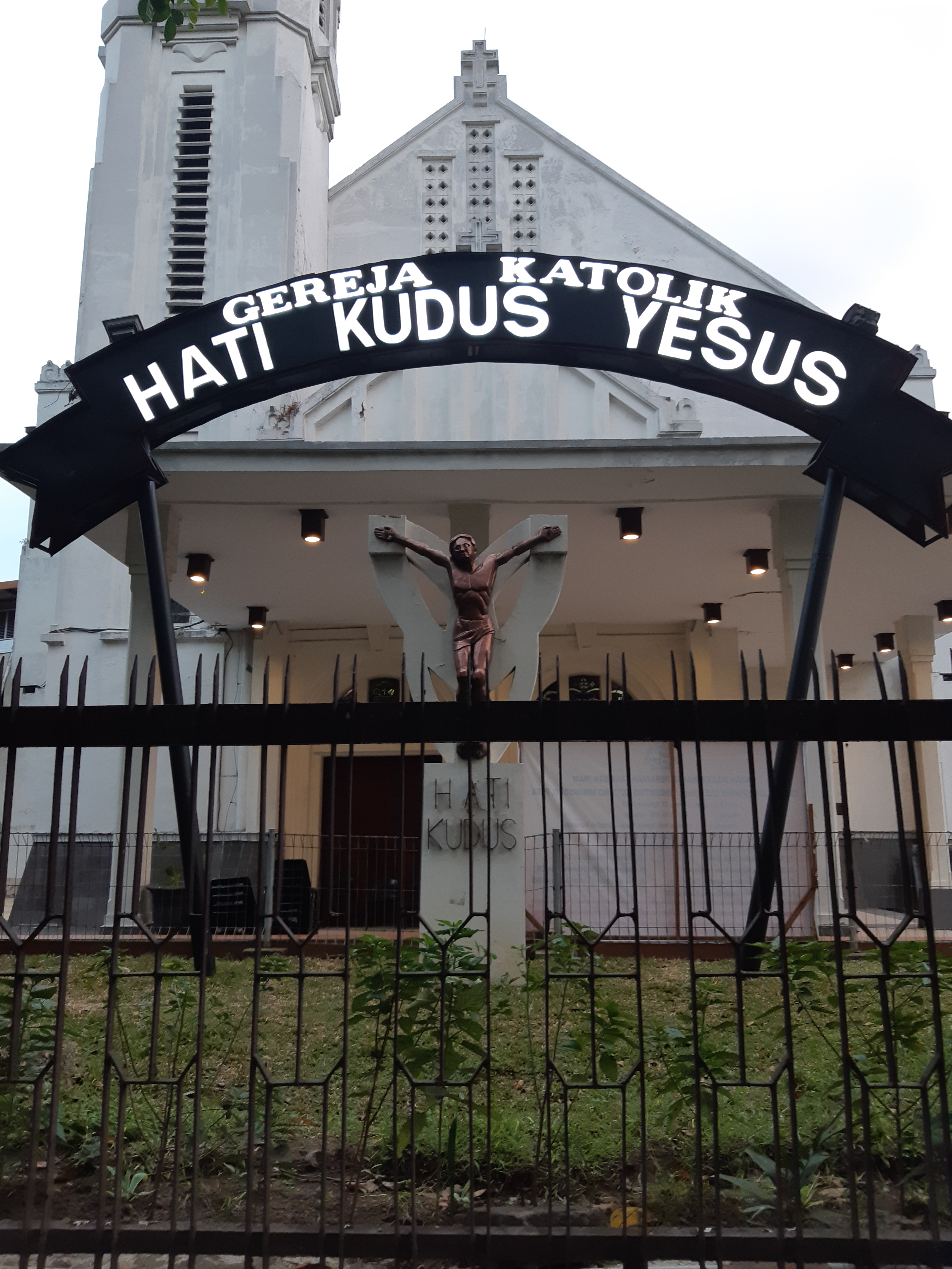 Tampak luar Gereja Katedral Hati Kudus Yesus Surabaya